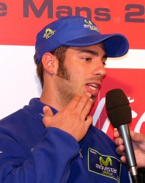 Marco Melandri 2005